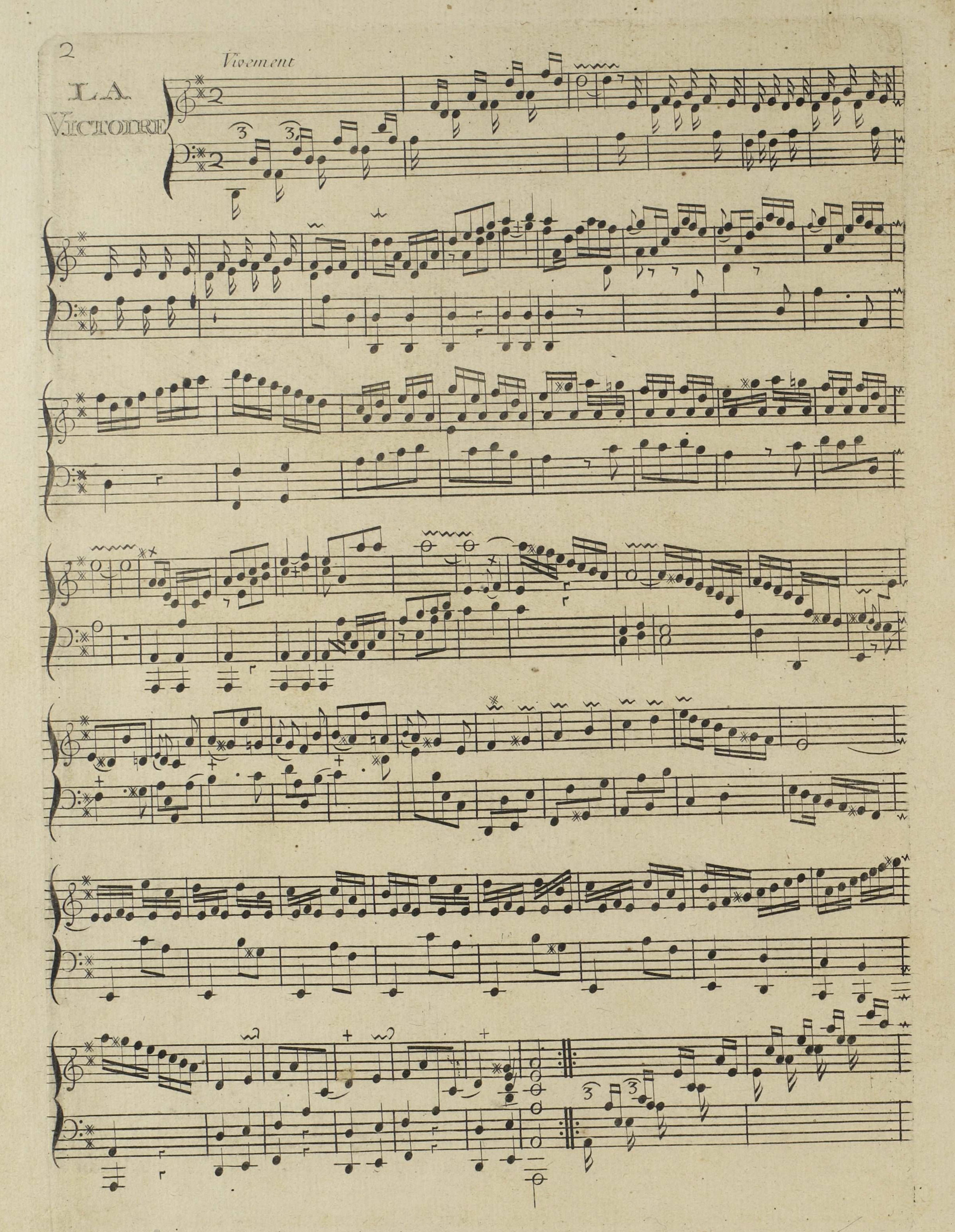 Jacques Duphly: "La Victoire" (2nd Livre de Pièces de clavecin, Paris 1748), détail.